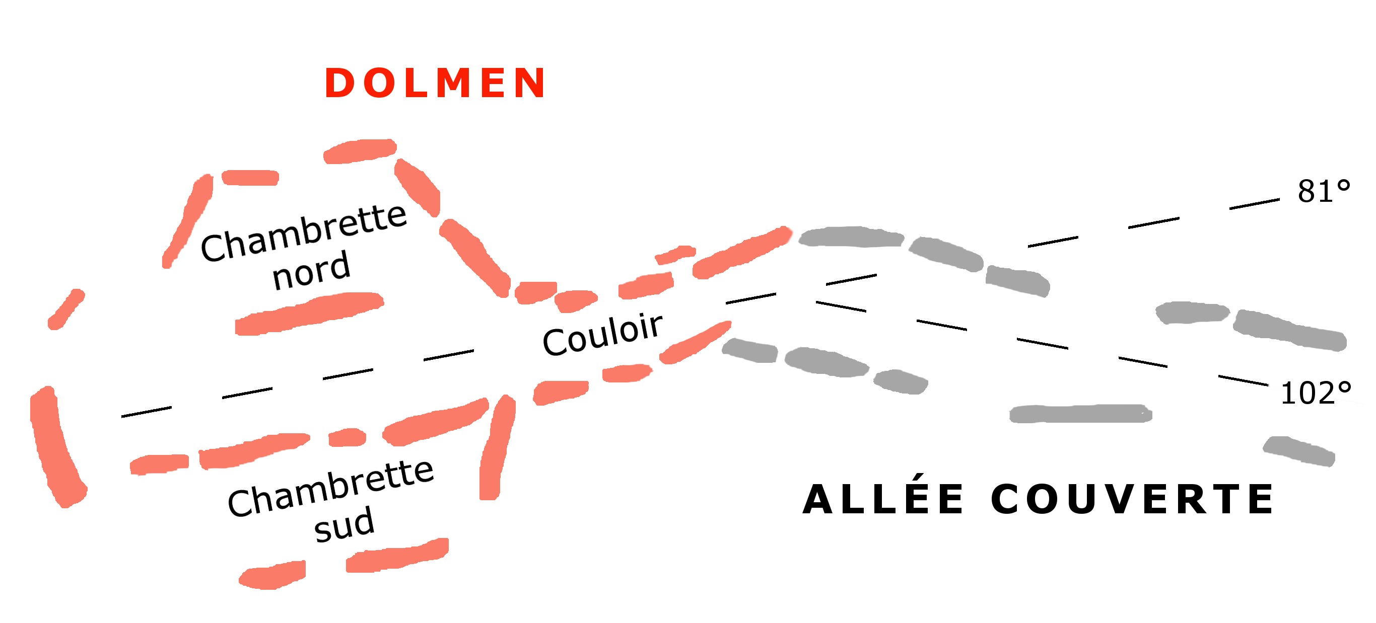 Relevé très approximatif, sans grand respect des proportions (je n'ai cherché qu'à donner la forme générale), des 2 monuments mégalithiques du tumulus de Beg an Dorchenn (pointe de la Torche) en Plomeur, pays Bigouden, Finistère, Bretagne ; recoupé avec le plan de Pierre-Roland Giot, « Le tumulus mégalithique de Beg an Dorchenn en Plomeur (Finistère) », Gallia, t. V, 1947, p. 168 ; et avec celui de Jean L'Helgouach, Les Sépultures mégalithiques en Armorique, Rennes, 1965, p. 149.